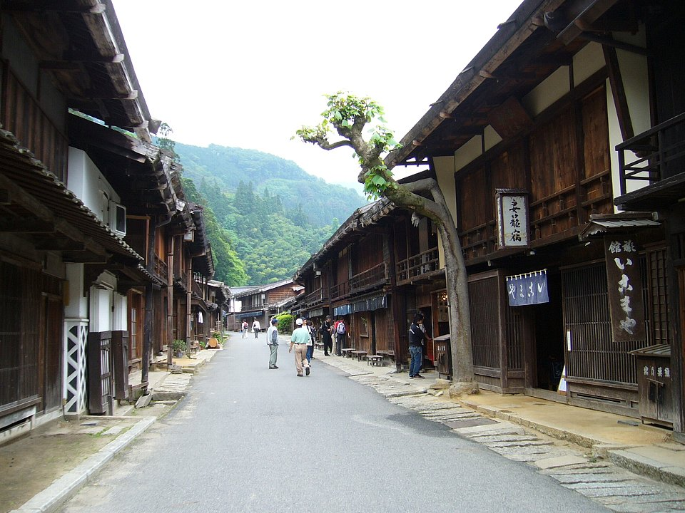 妻籠宿 寺下の町並 2006年6月 Bakkai撮影